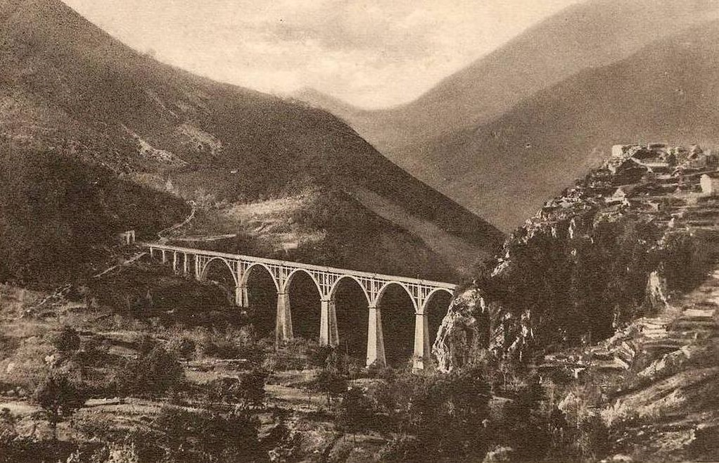 Viadukt Serra der Bahnstrecke Lagonegro–Spezzano Albanese bei Lagonegro